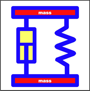 Schematische voorstelling van een Massa veersysteem met demping. Laurens van Lieshout november 2005